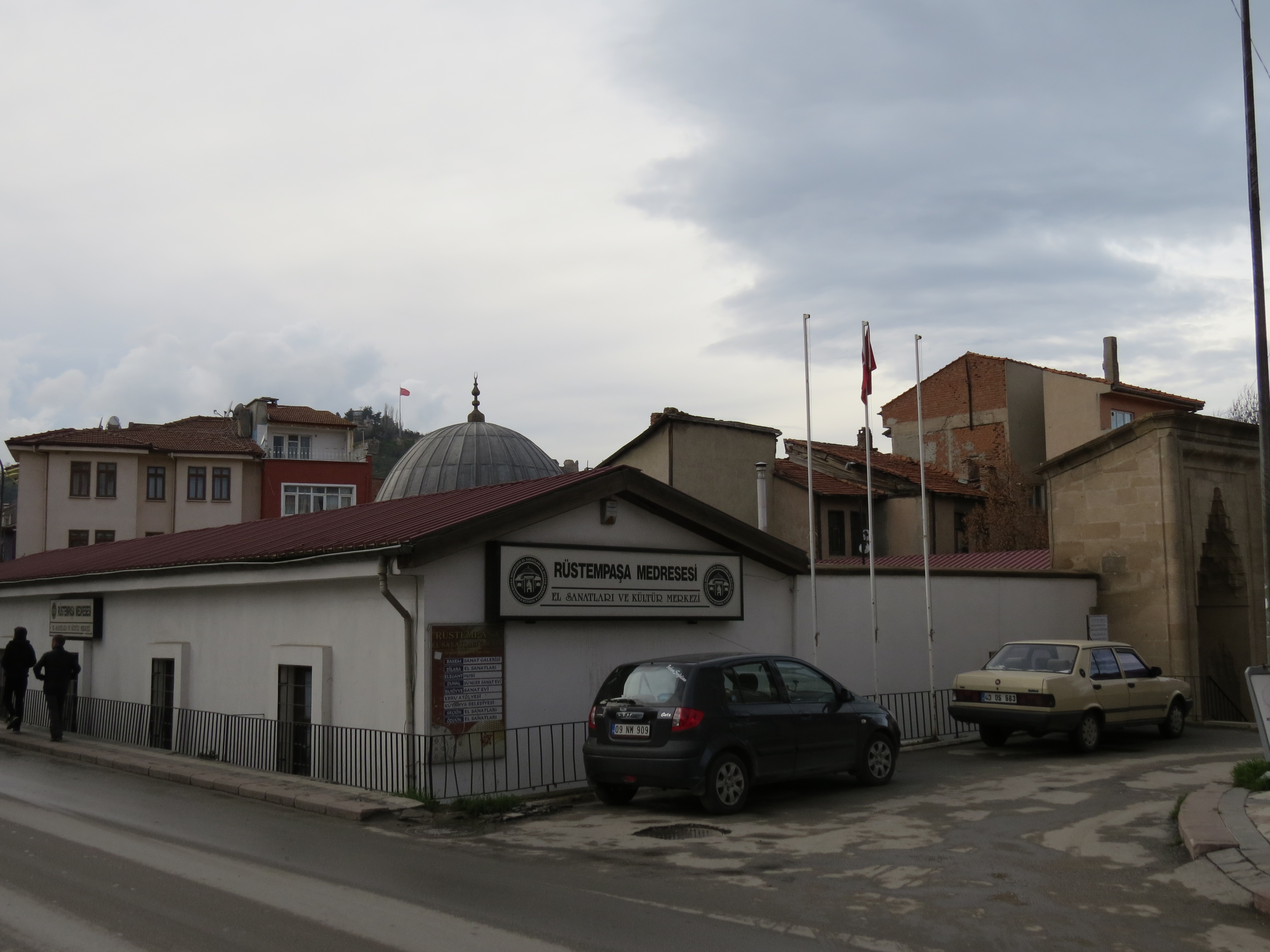 rüstem paşa medresesi